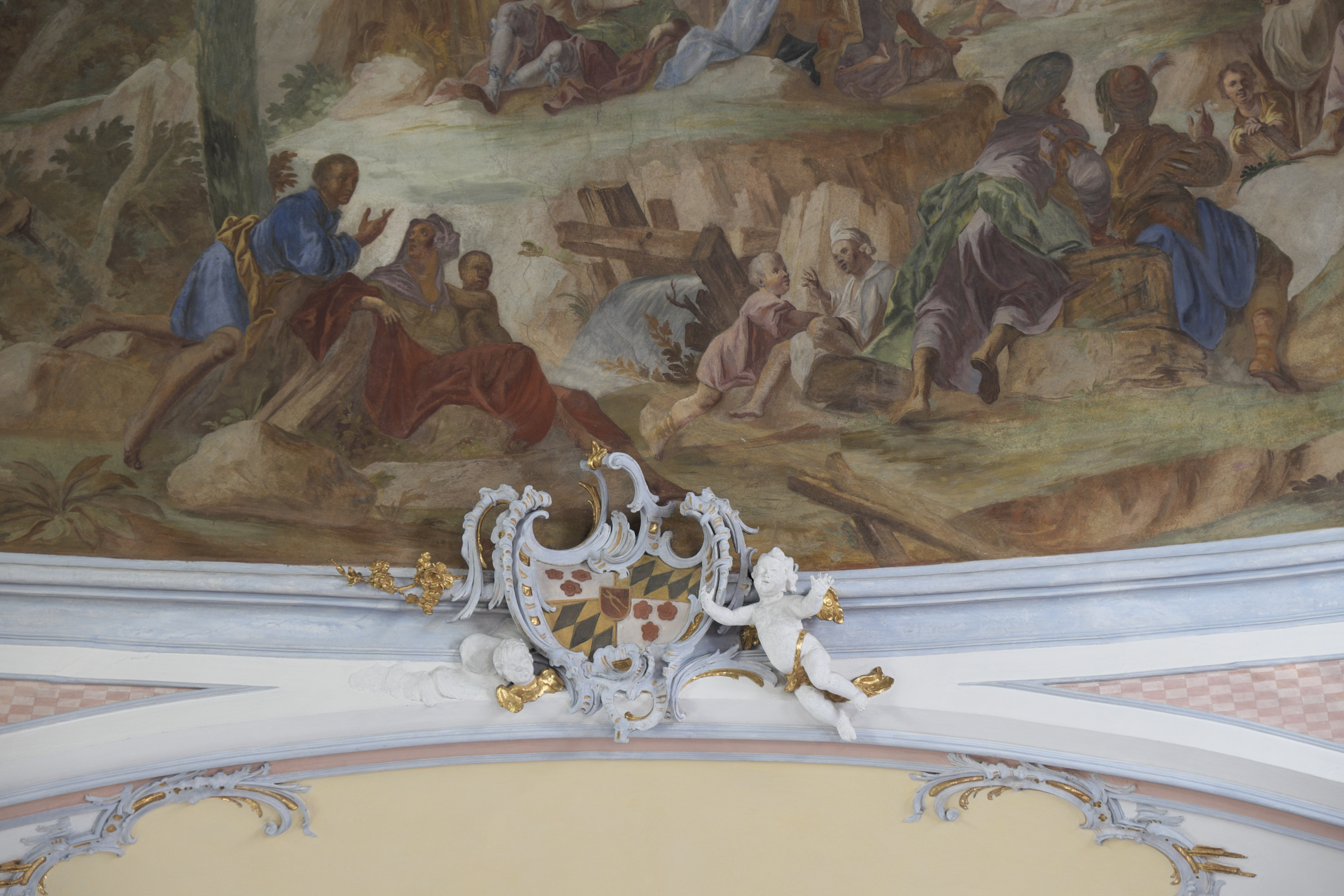 Katholische Pfarrkirche St. Johannes Baptist in Inning am Ammersee im Landkreis Starnberg (Bayern/Deutschland), Stuckdekor von Tassilo Zöpf, von 1767, Chorbogen mit dem Wappen der Grafen von Toerring